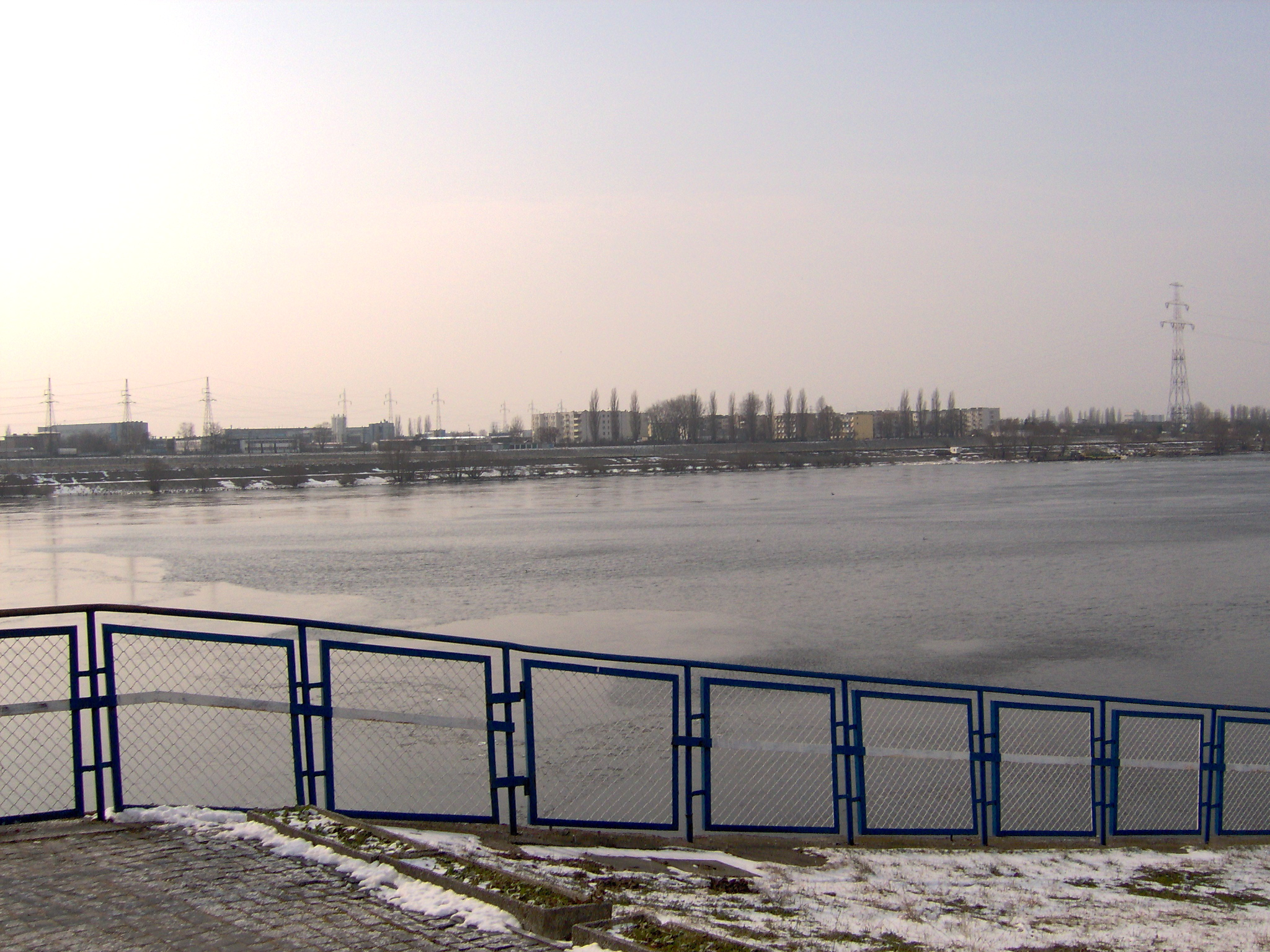 Zapora wodna na Wiśle i okolice (2007 r.)